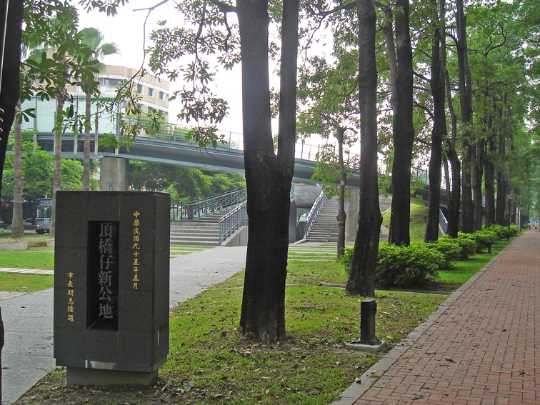 中文（台灣）: 臺中市興大園道。